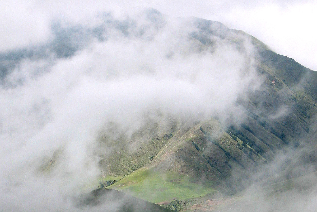 Pastizales de altura en cercanías de El Rincón, provincia de Tucumán